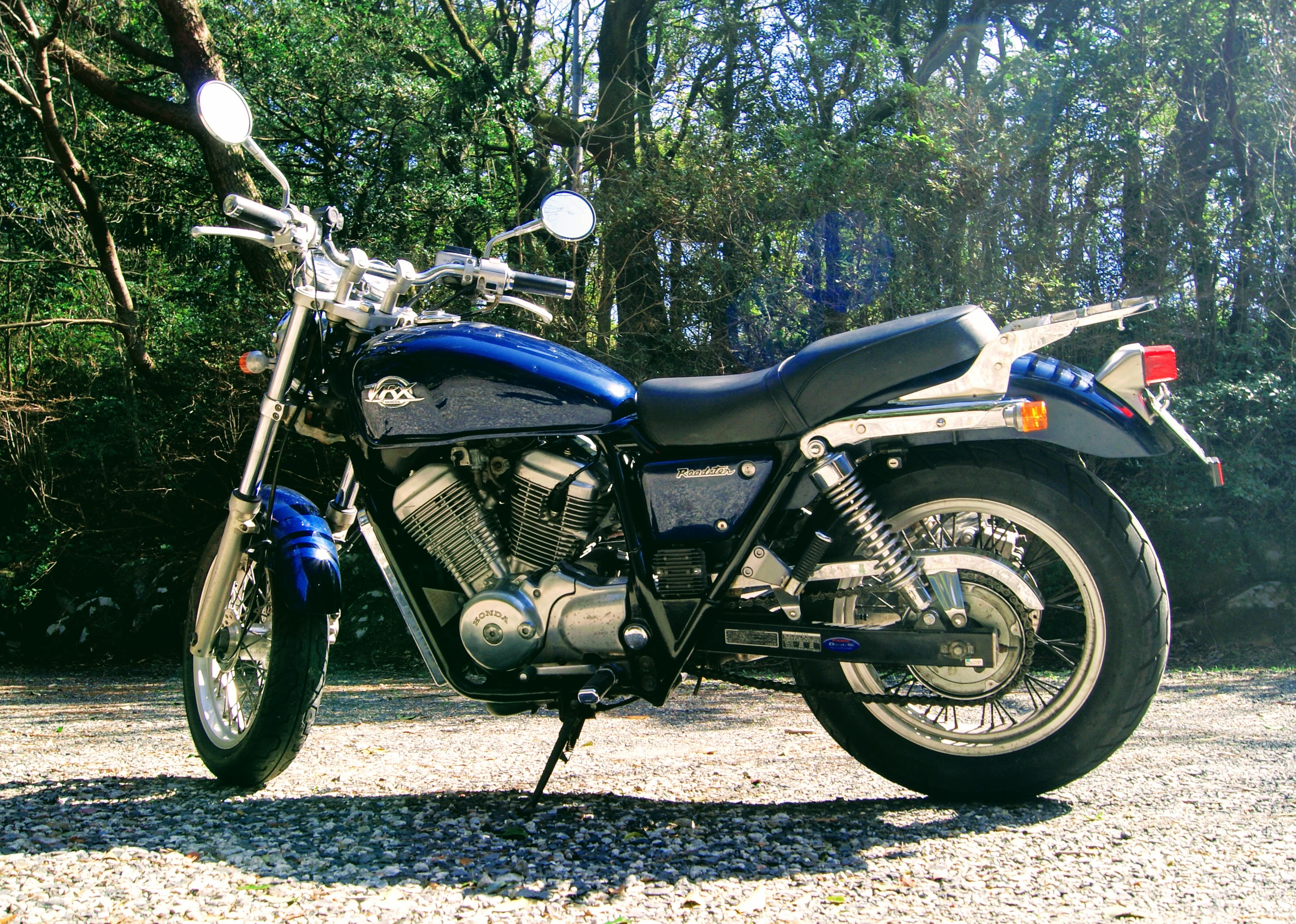 Honda VRX 400 Roadstar